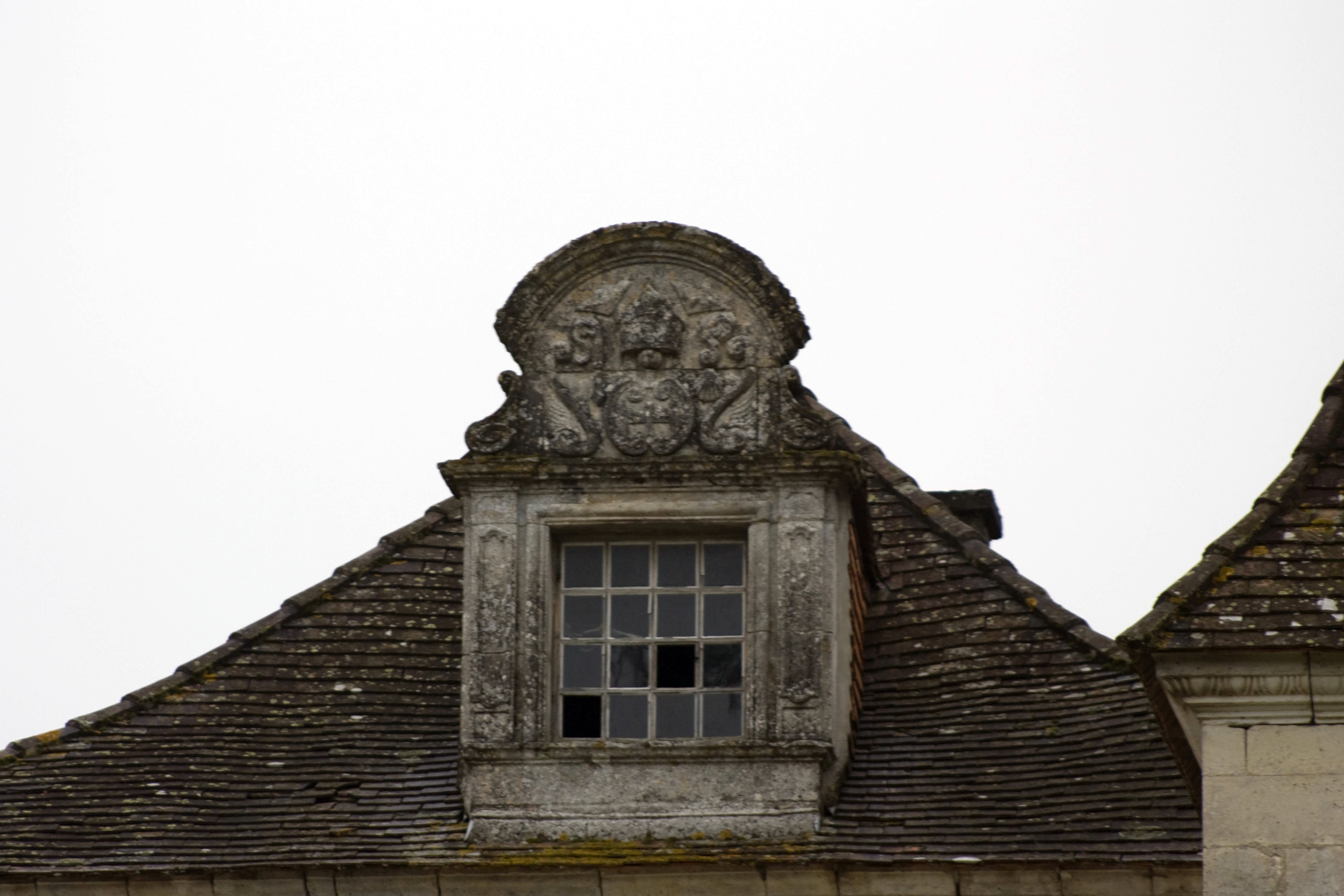 Fenêtre d'un chien assis, aux armes de l'Abbé, mitre, et coquille St-Jacques, car l'abbaye se trouve sur le chemin de Compostelle.